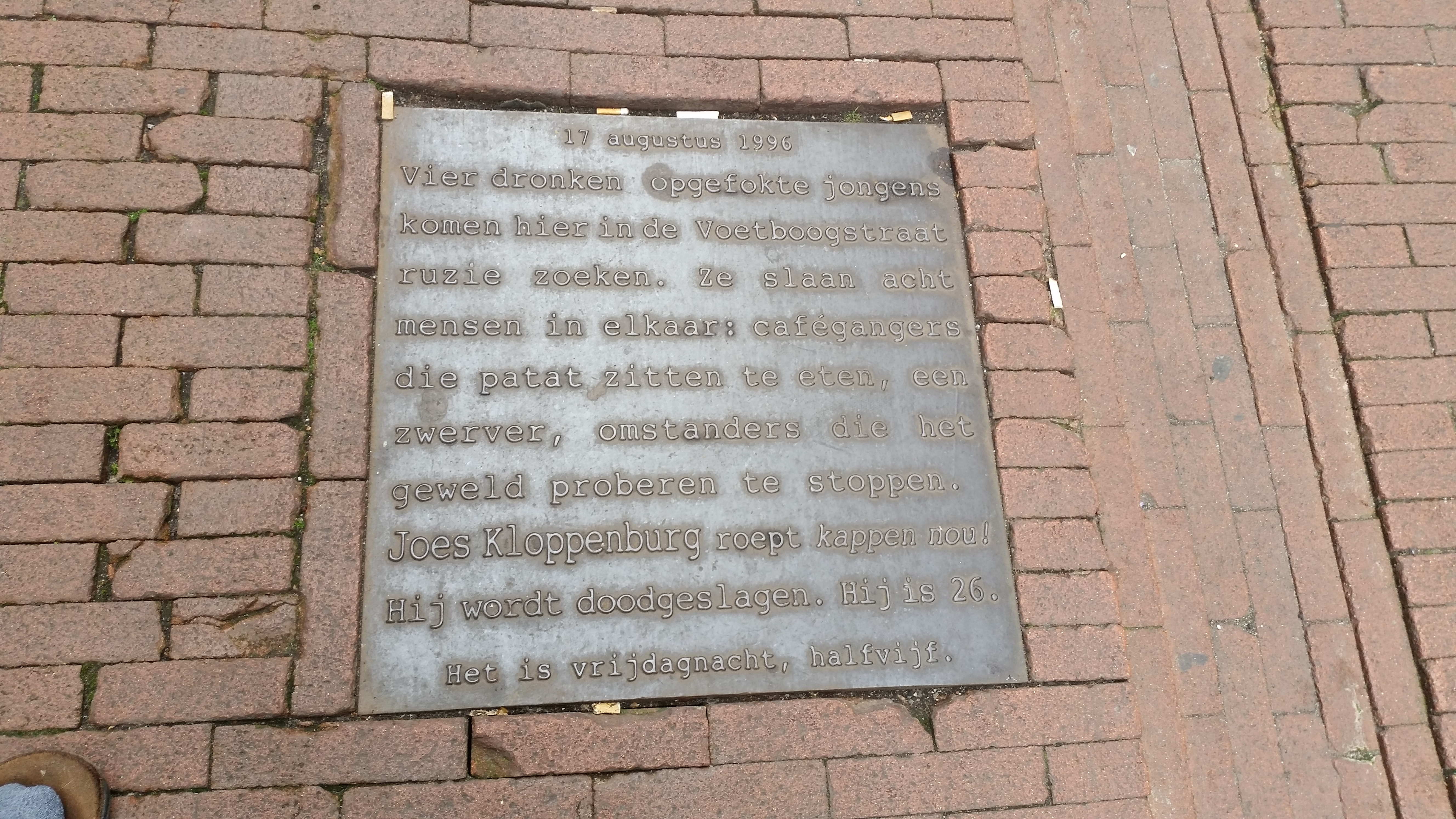 Monument voor Joes Kloppenburg, Voetboogstraat, Amsterdam; plaquette